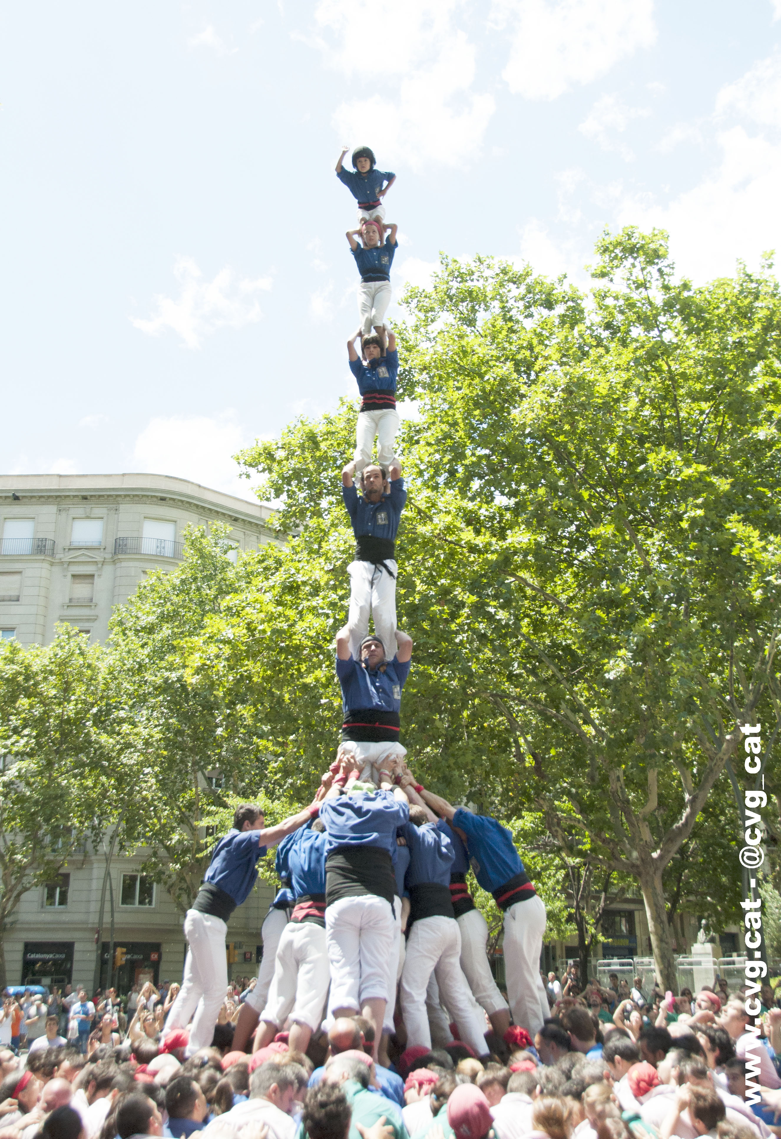 Primer pilar de 7 amb folre descarregat pels Castellers de la Vila de Gràcia durant la Festa major del Camp d'en Grassot 2014.